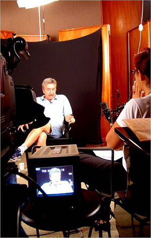 Entrevistas